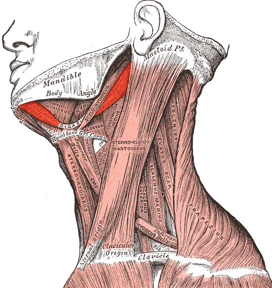 Digastricus muscle